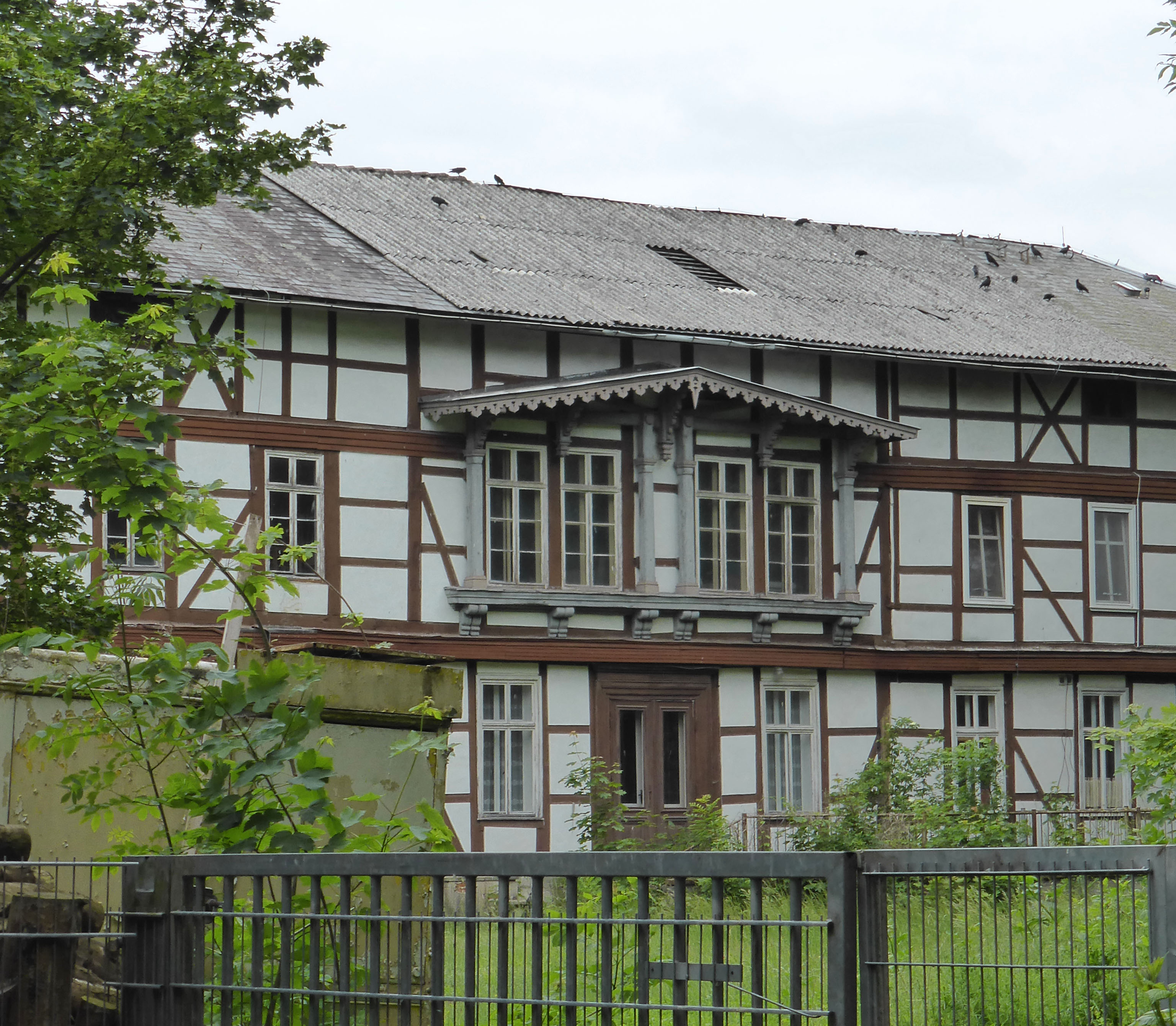 Gräfliches Schloss in Beetzendorf, Teilansicht der Rückseite.